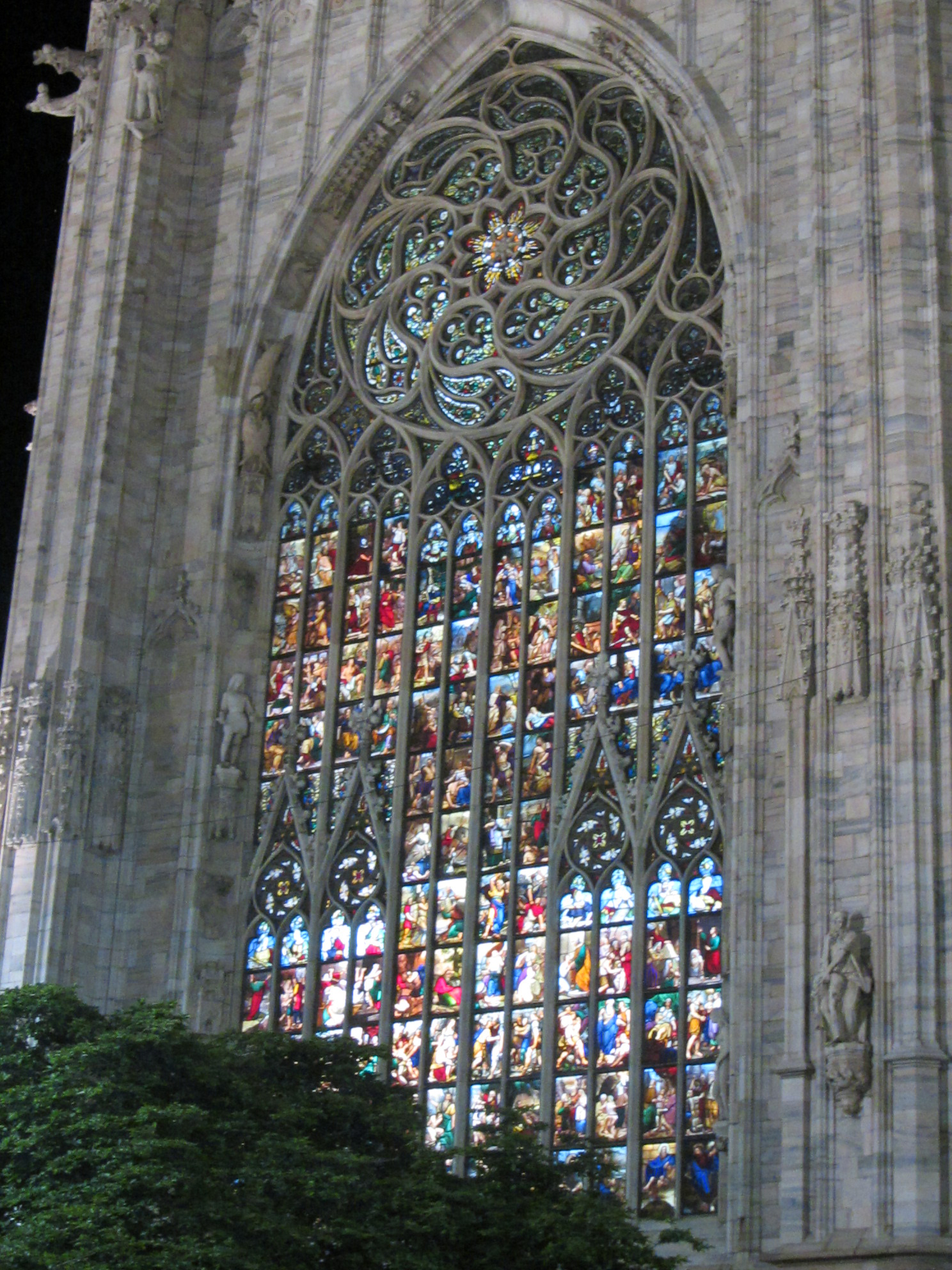 Vetrate illuminate del Duomo di Milano